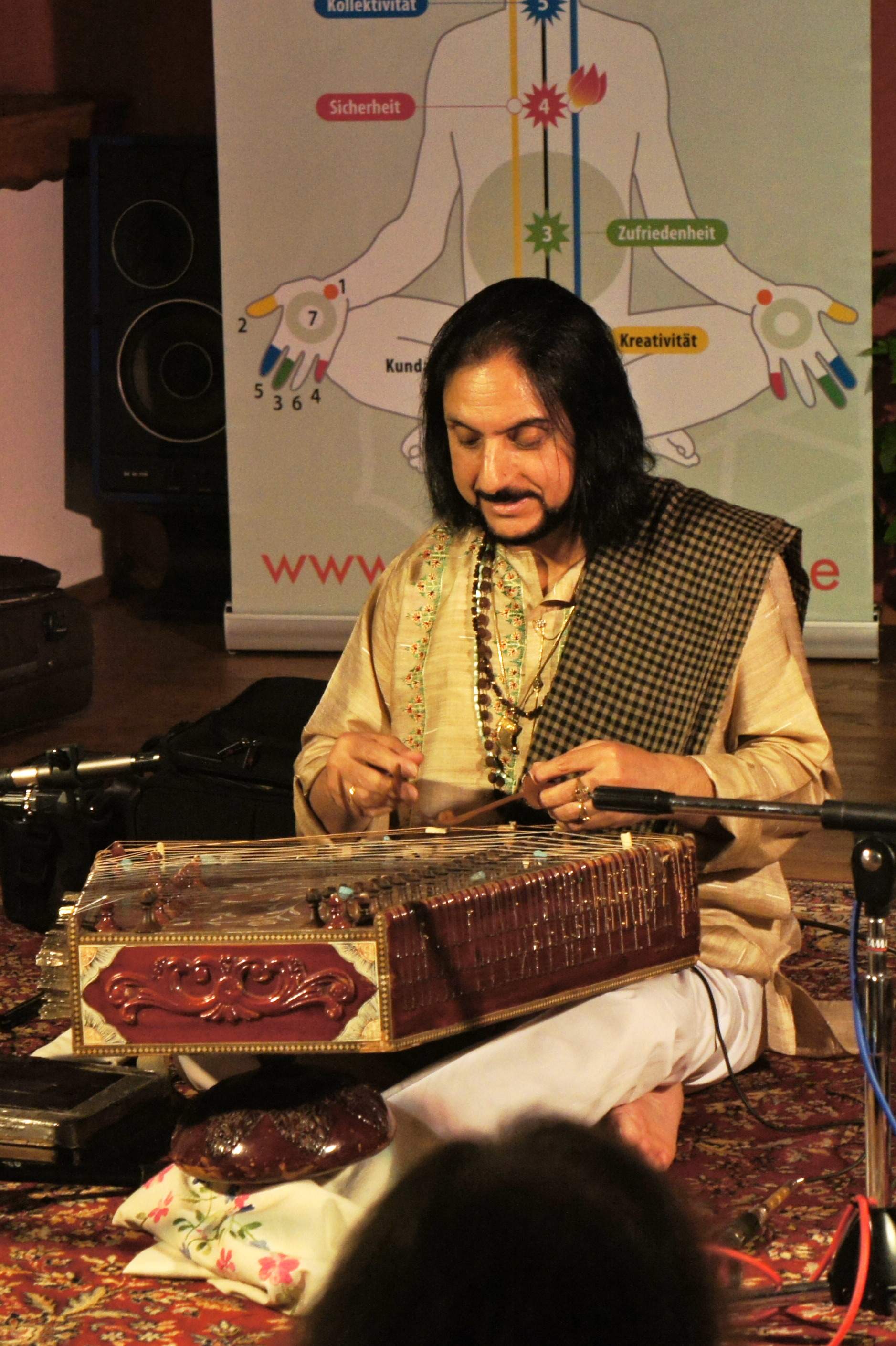 Lange Nacht der Musik in München am 13. Mai 2013: Bhajan Sopori im Sahaja Yoga Zentrum